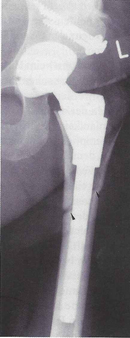 Röntgenaufnahme vom linken Hüftgelenk einer Frau mit dysplasiebedingter Hüftluxation: Zementfreie Hüftendoprothese mit autologer Pfannendachplastik, subtrochanterer Verkürzung und modularem S-ROM-Schaft